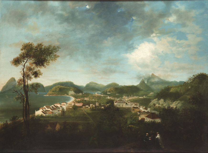 Título: CATETE E PRAIA DO FLAMENGO VISTOS DA GLÓRIA Data: 1840 - 1845 Dimensões físicas: w119 x h84 centimeters Procedência: Casa Geyer/Museu Imperial/Ibram/Minc Tipo: Óleo sobre tela